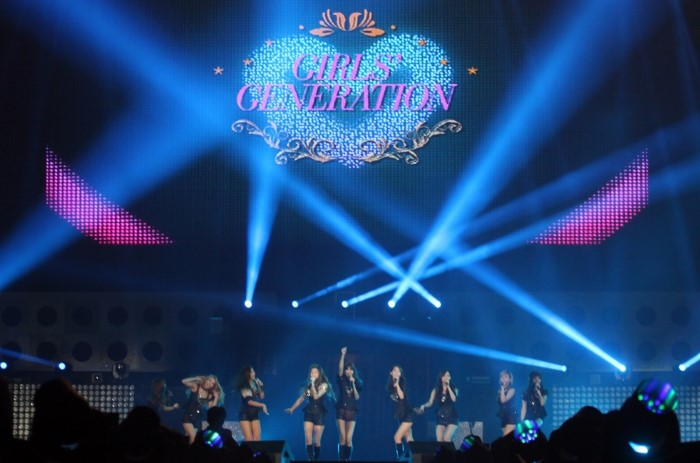 2012년 7월 12일 여수 엑스포 팝 페스티벌에서 소녀시대.